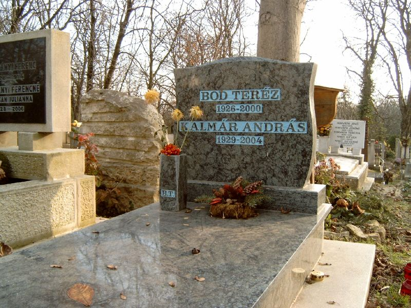 Bod Teréz (Karcag, 1926. október 25.– 2000.) színésznő és Kalmár András (Budapest, 1929. jún. 29.– 2004.) rendező sírja Budapesten. Farkasréti temető: 25-5-72